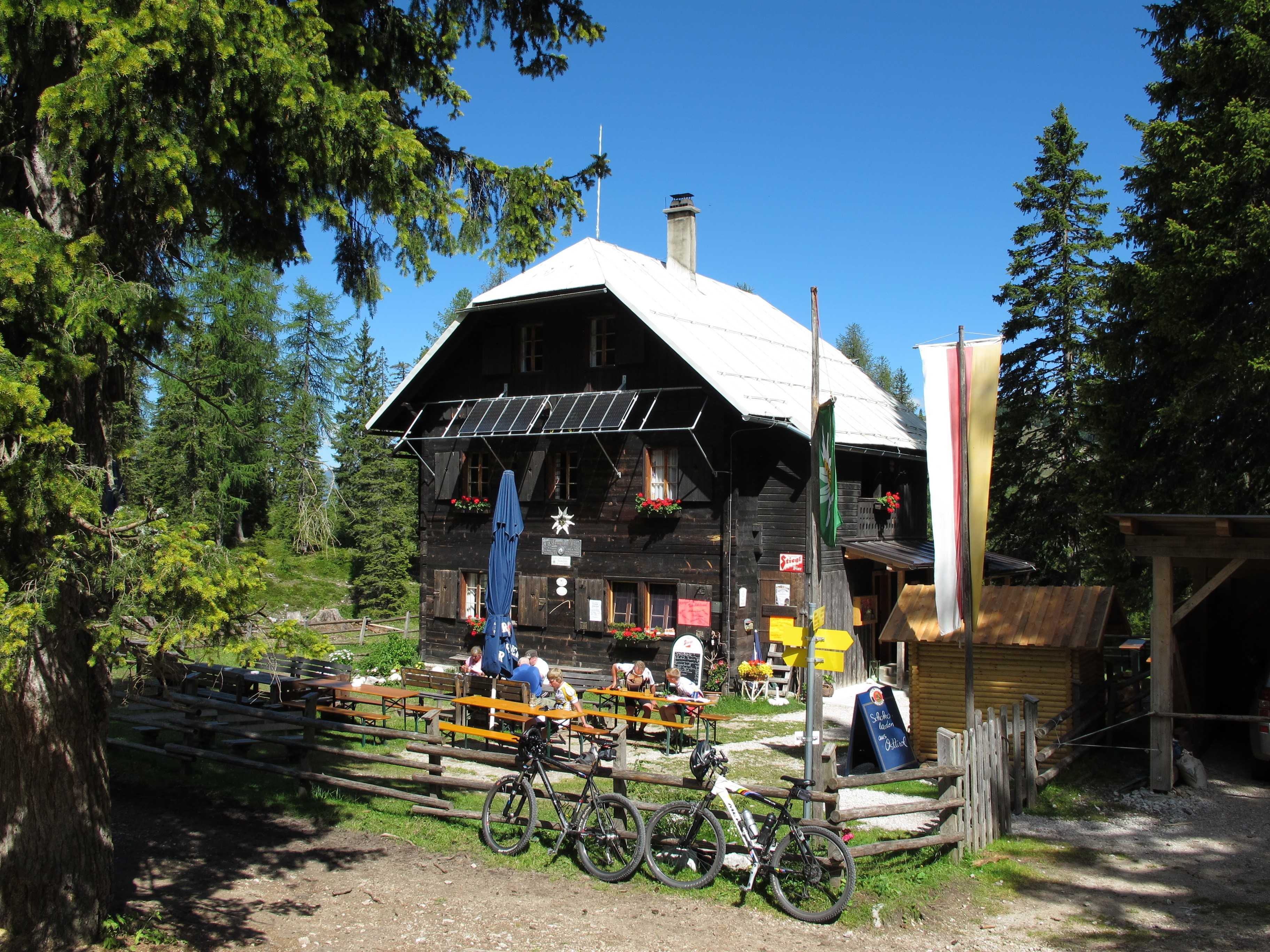 E.T.-Compton-Hütte, Kärnten, Österreich